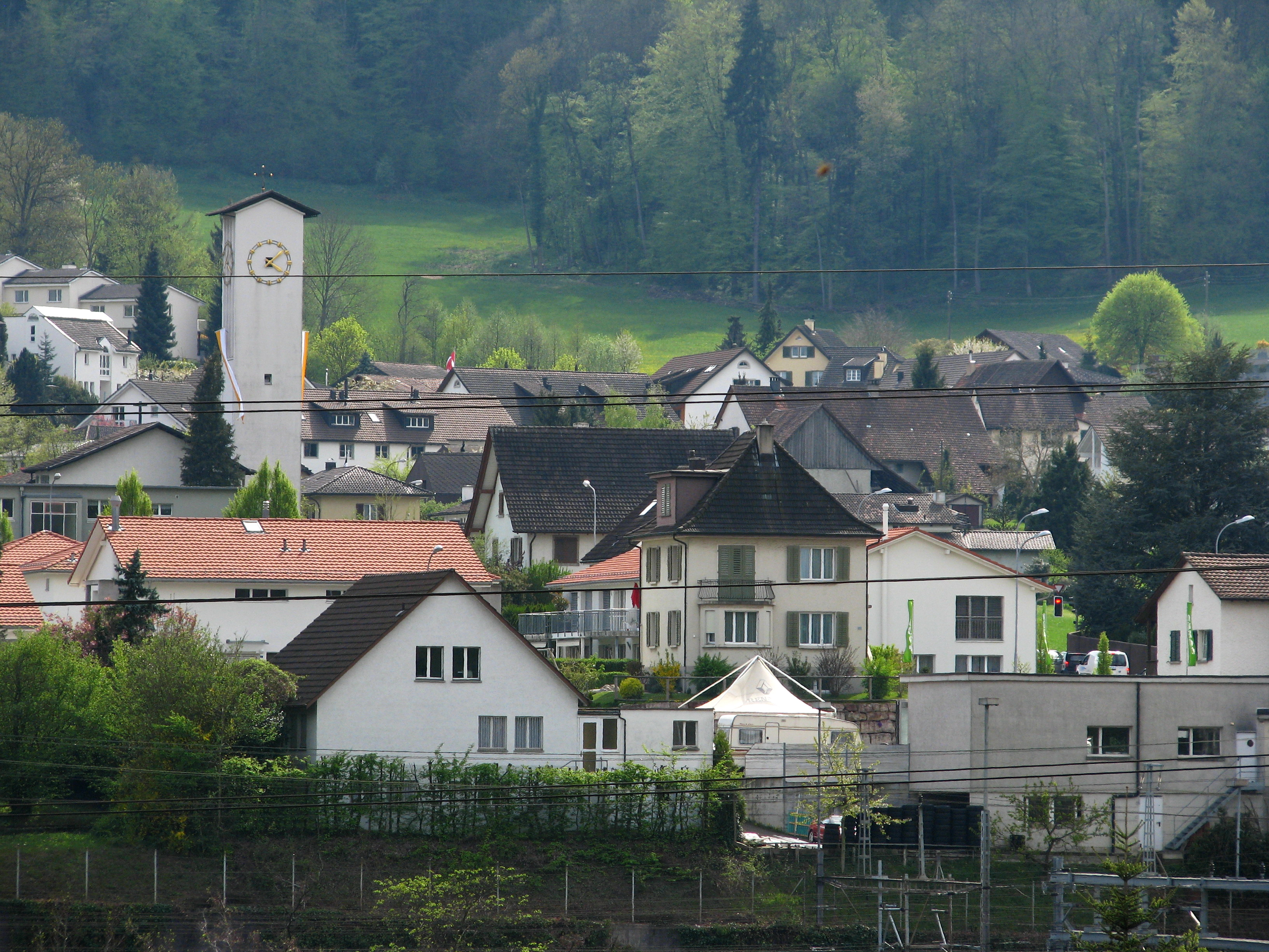 Killwangen as seen from Würenlos